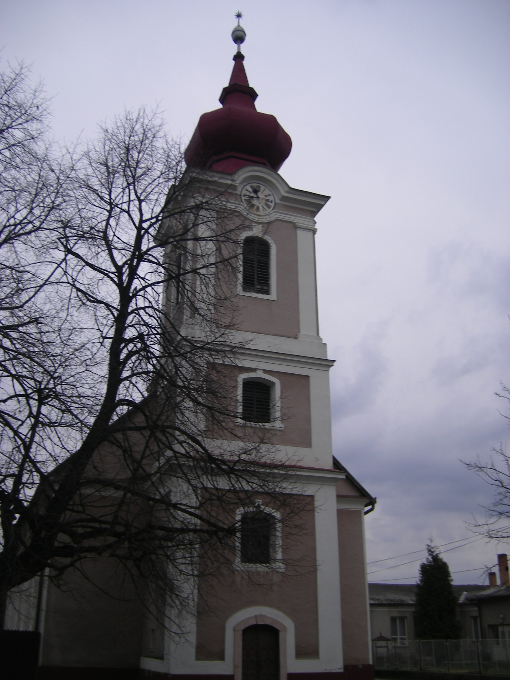 Hetény - református templom